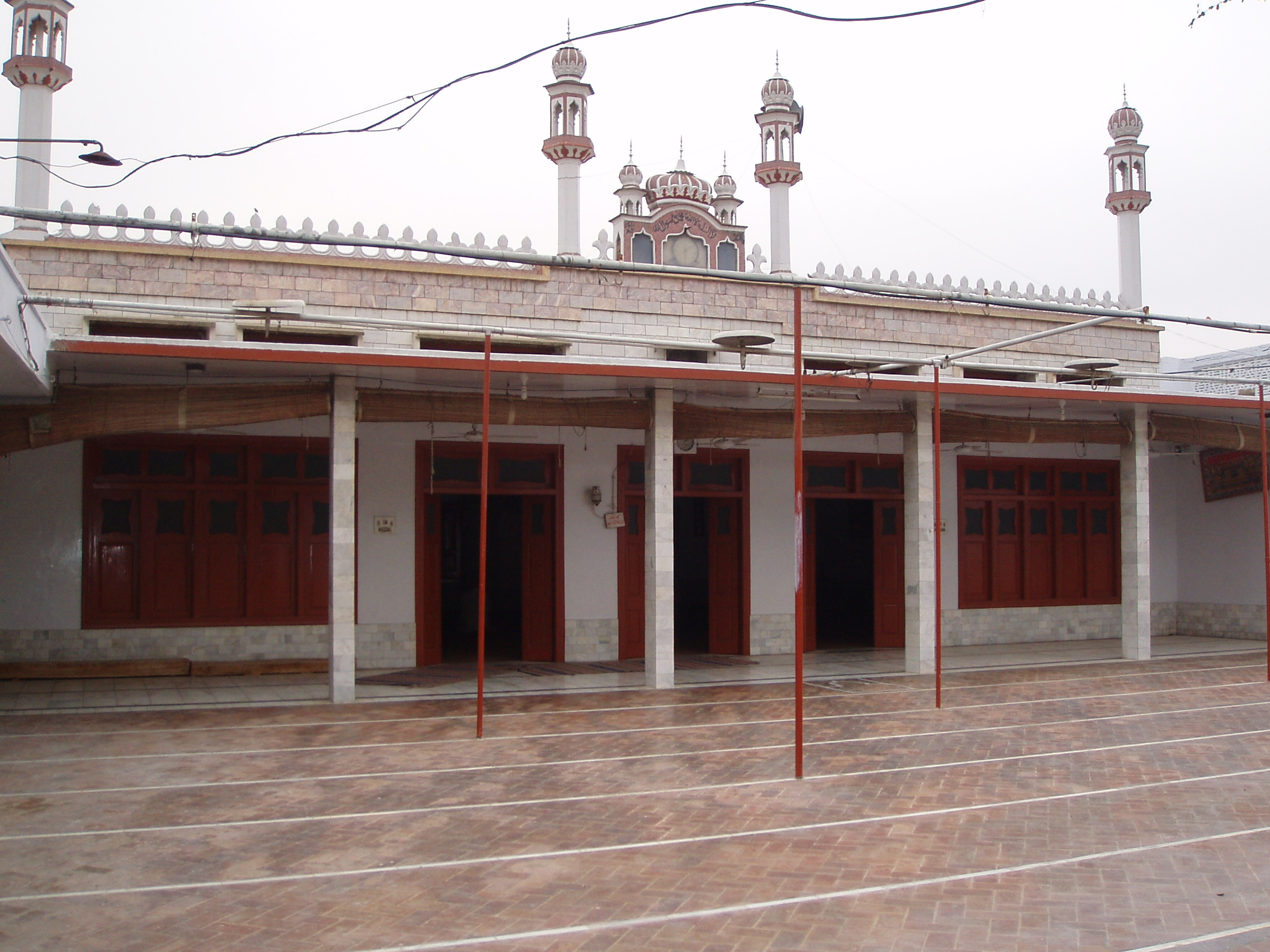 Kuzkandi Jamiah \masjid